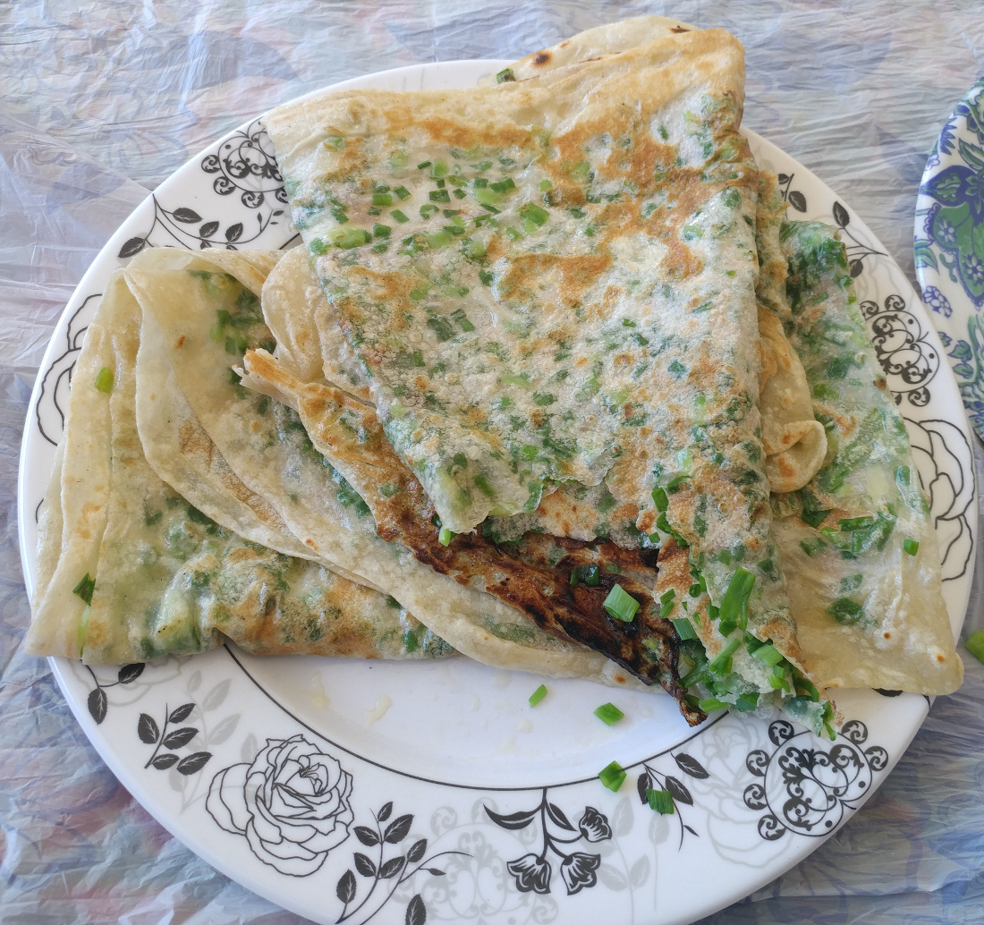 کلانه نوعی غذای کردی.